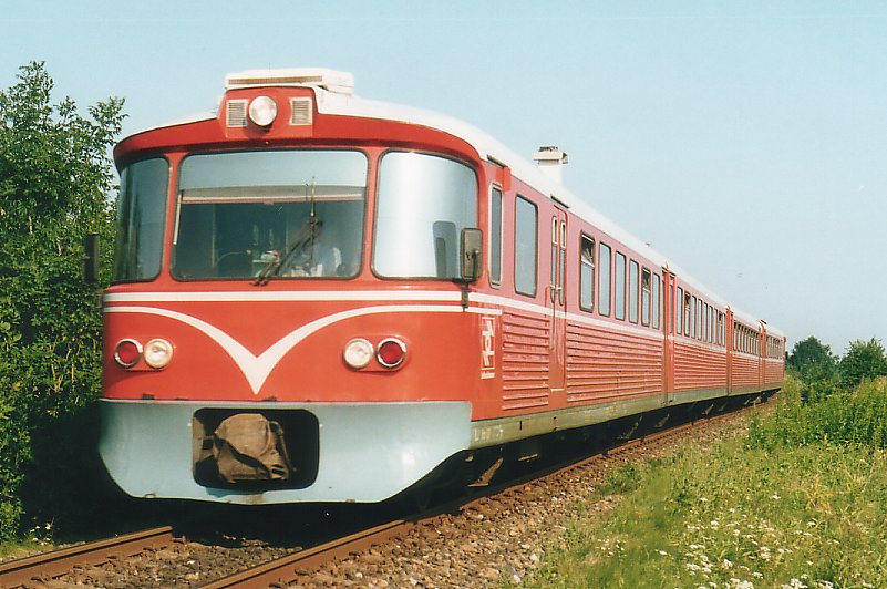 Lollandsbanen Lynette DMU near Krungerup, Denmark